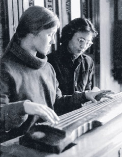 中文（香港）: 林西莉（前）和王迪